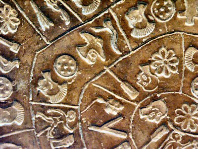 Motiv: Diskos von Phaistos, Detail Fotografiert am: 11-Aug-2004 Ort: Archäologisches Museum, Heraklion, Kreta, Griechenland Fotograf: asb Kamera: Minolta Dimage 7 Hi Lizenz: GNU FDL 19:44, 17. Aug 2004 Asb 400 x 300 (117137 Byte) (Diskos.von.Phaistos_Detail.2_11-Aug-2004_asb_PICT3373.JPG)